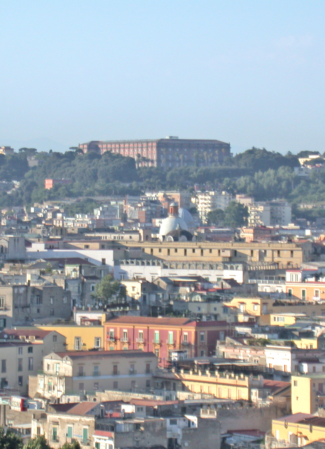 Italia, regione Campania, Napoli, palazzo di Capodimonte, vista da presso la certosa di San Martino